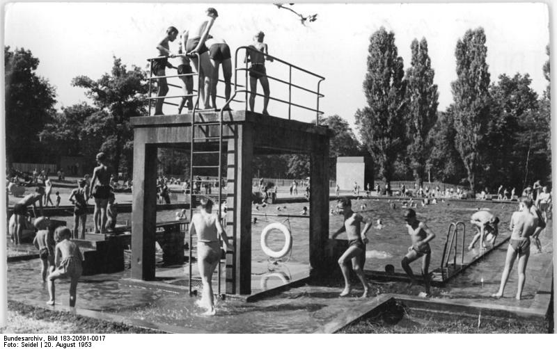 Chemnitz, Freibad Zentralbild Volksstimme-Seidel Kne-Ho. 20.8.1953 Das Luftbad im Zeisigwald von Karl-Marx-Stadt wurde durch viele freiwillige Helfer wieder instandgesetzt und am 9.8.1953 wieder eröffnet.